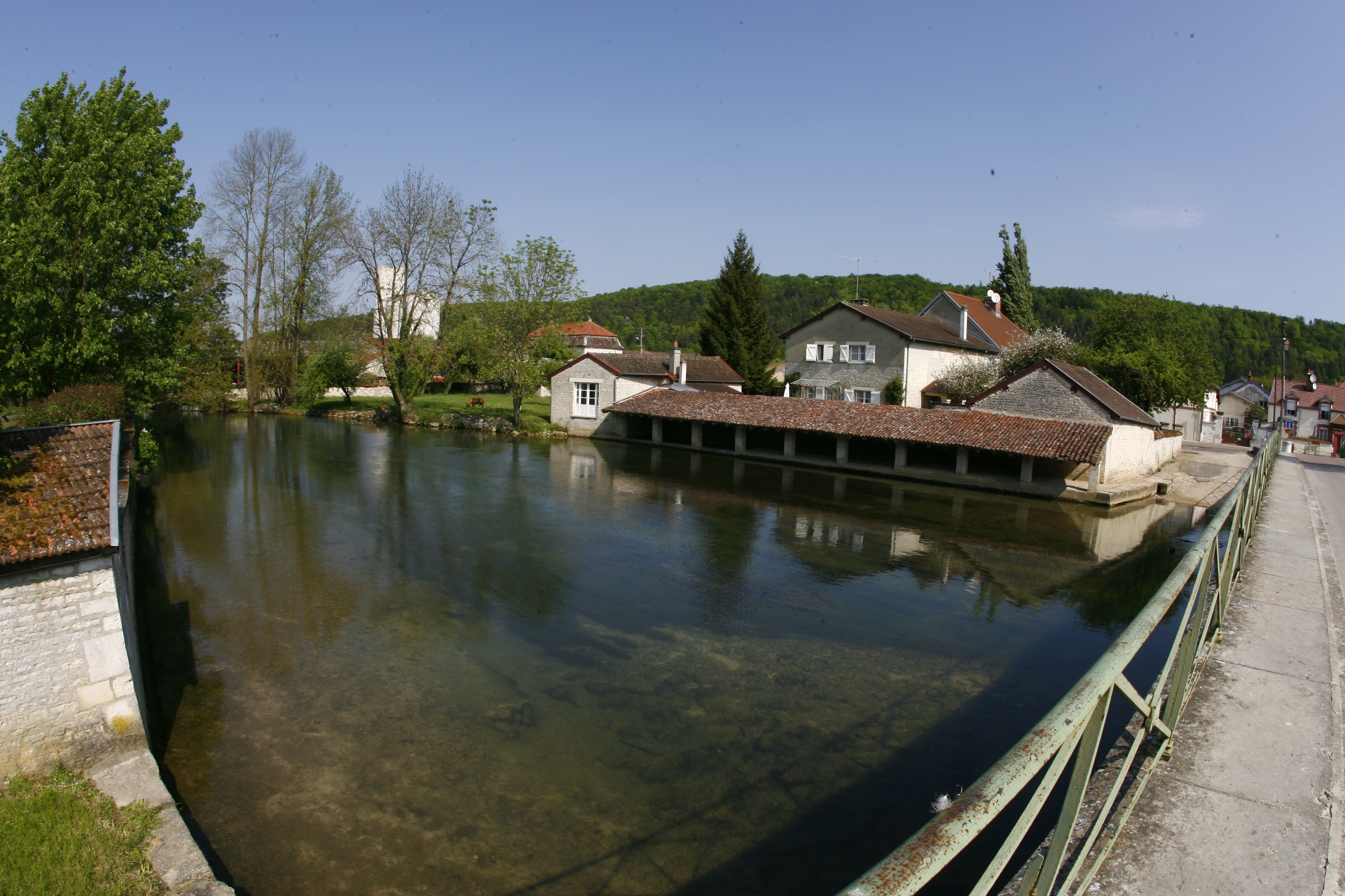 L'Aujon, le lavoir à Longchamp-sur-Aujon, Avril 2007. (photo : © Bertrand THIEBAULT)